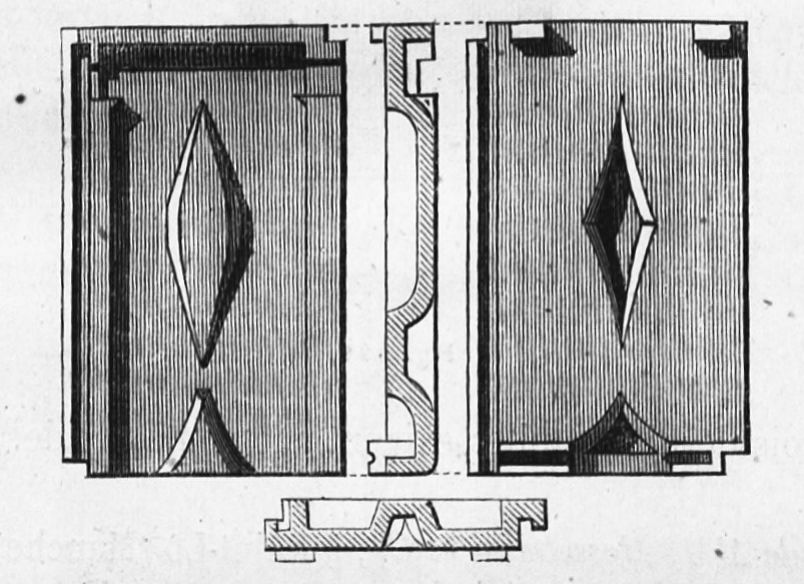 Falzziegel der Brüder Gilardoni